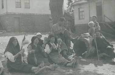 Жители от с. Бръшлян, Бургаско.